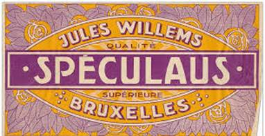 De 19de eeuwse Vlaamse variant van speculaas, m.n. “speculaus” verwerd tijdens de 20ste eeuw in Brussel tot het belgicisme “speculoos”.